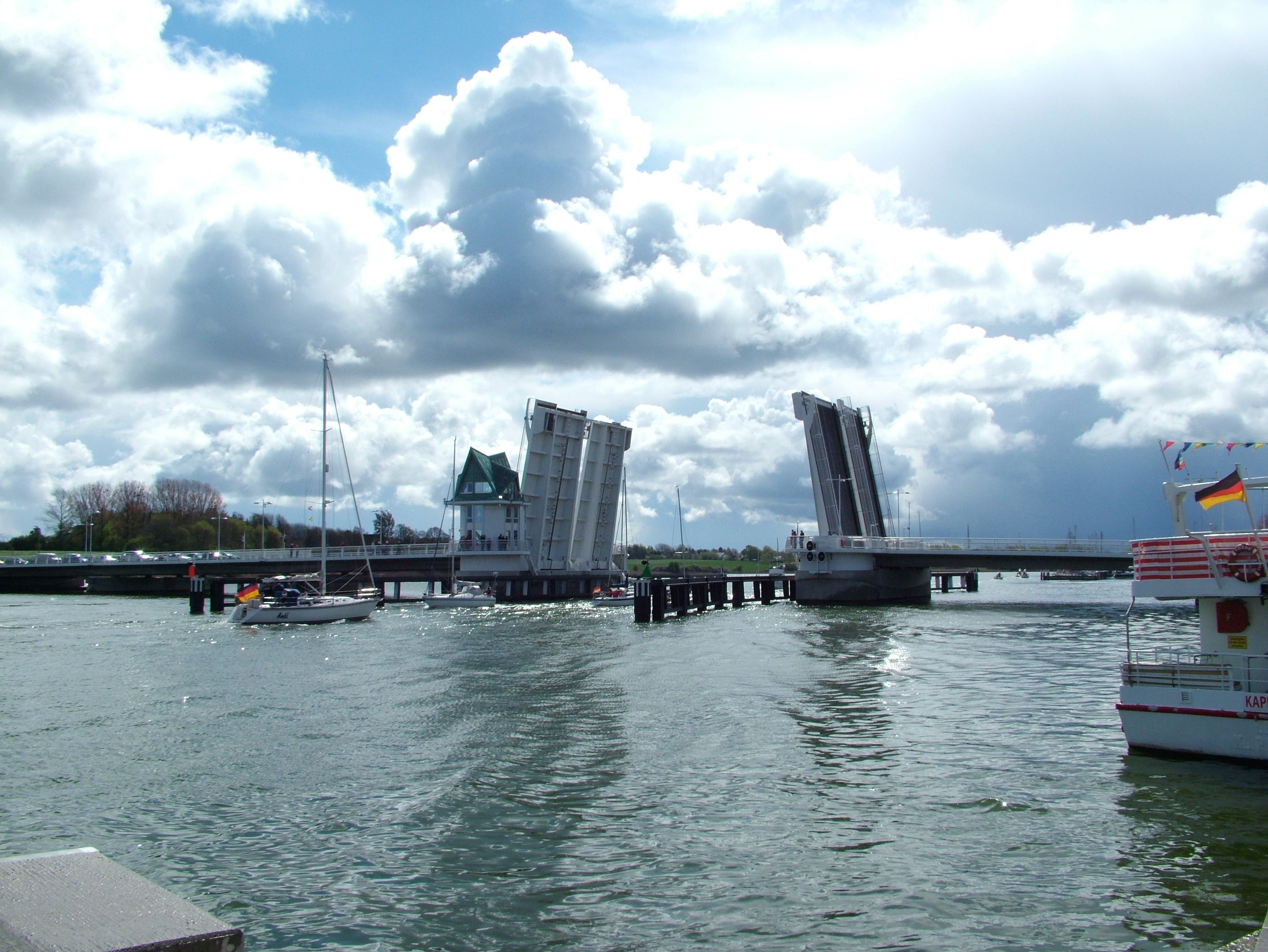 Das Bild zeigt die Klappbruecke in Kappeln / Schleswig/Holstein. Das Bild habe ich selber am 07.05.2005 aufgenommen.